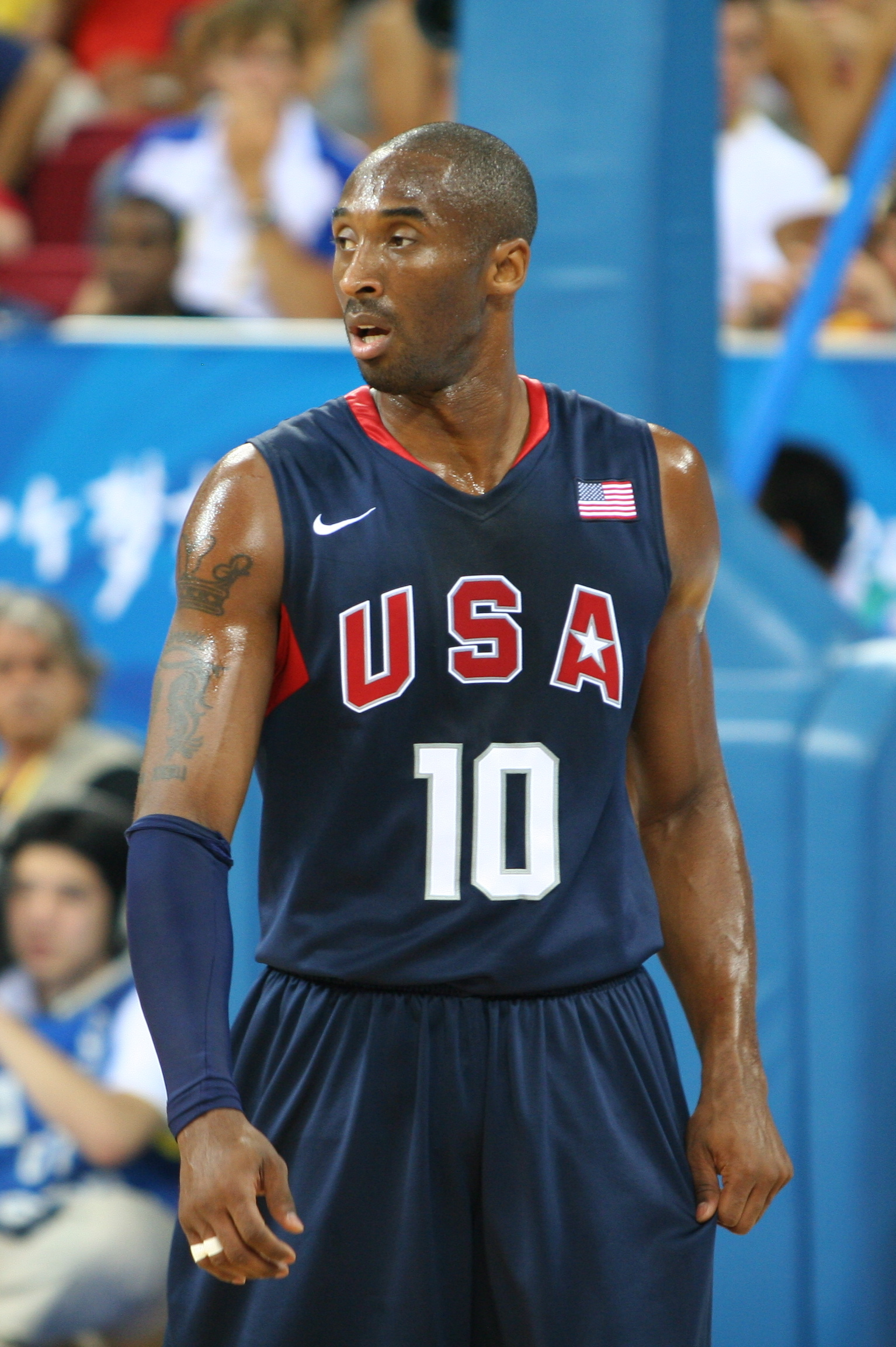 Kobe Bryant en semifinales de los J.J.O.O. Beijing 2008.